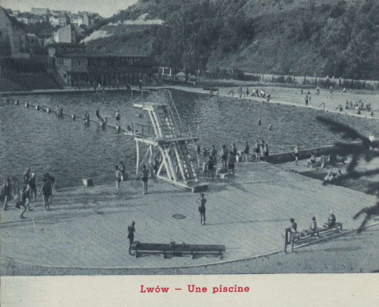 Басейн "Залізна вода". Поштівка до 1939 року